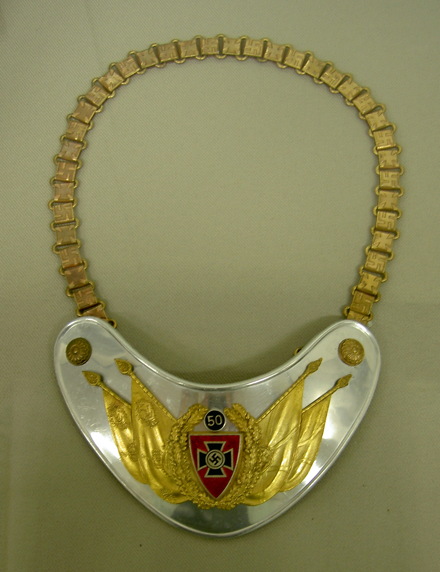 Ring-kragen für Fahnenträger des NS-Reichskriegerbunds (Kyffhäuserbund), um 1935 Legal disclaimer This image shows (or resembles) a symbol that was used by the National Socialist (NSDAP/Nazi) government of Germany or an organization closely associated to it, or another party which has been banned by the Federal Constitutional Court of Germany. The use of insignia of organizations that have been banned in Germany (like the Nazi swastika or the arrow cross) are also illegal in Austria, Hungary, Poland, Czech Republic, France, Brazil, Israel, Ukraine, Russia and other countries, depending on context. In Germany, the applicable law is paragraph 86a of the criminal code (StGB), in Poland – Art. 256 of the criminal code (Dz.U. 1997 nr 88 poz. 553).